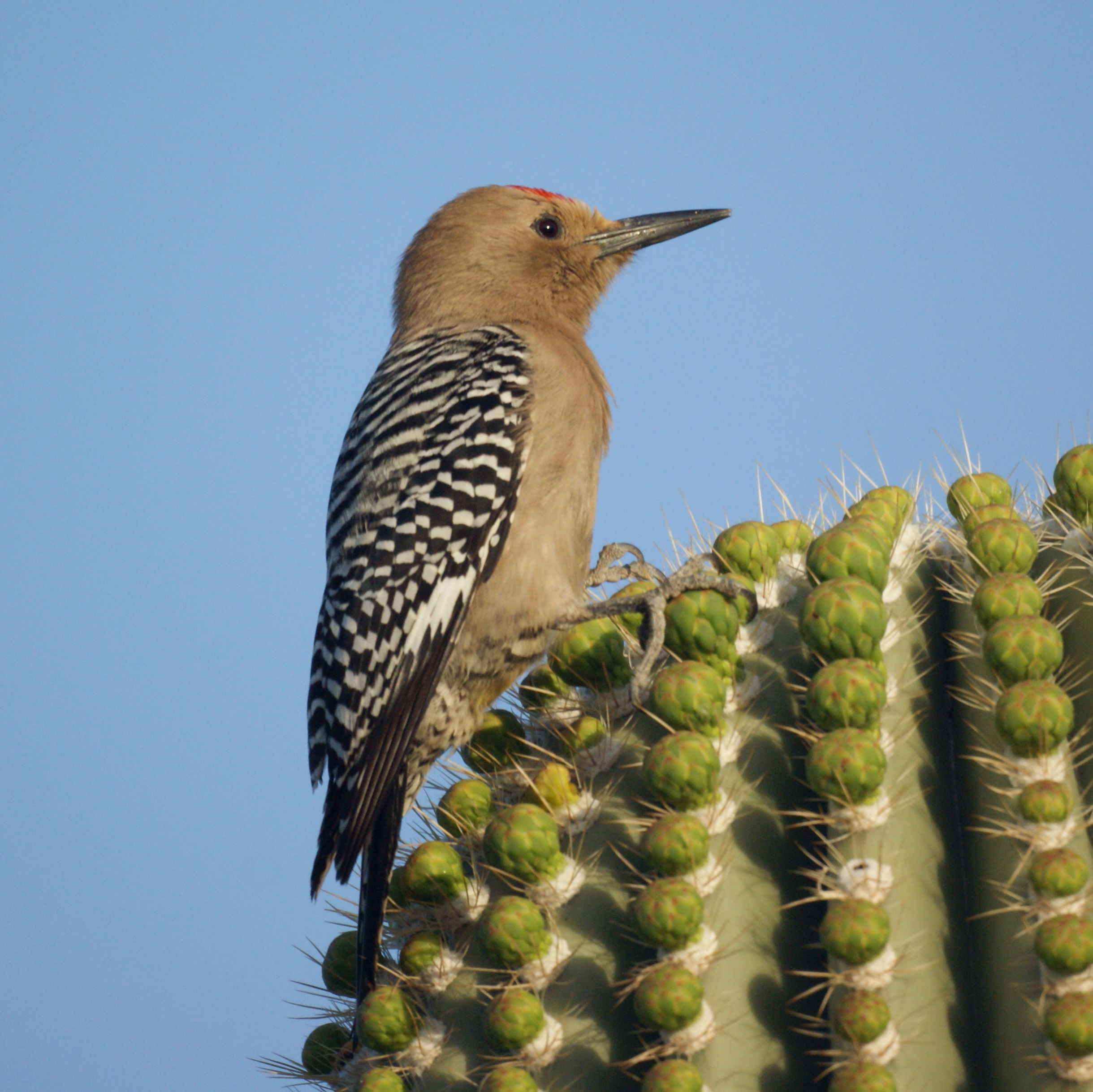 Melanerpes uropygialis, Tucson, Arizona